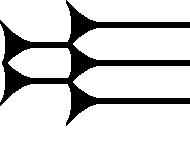 Cuneiform sign